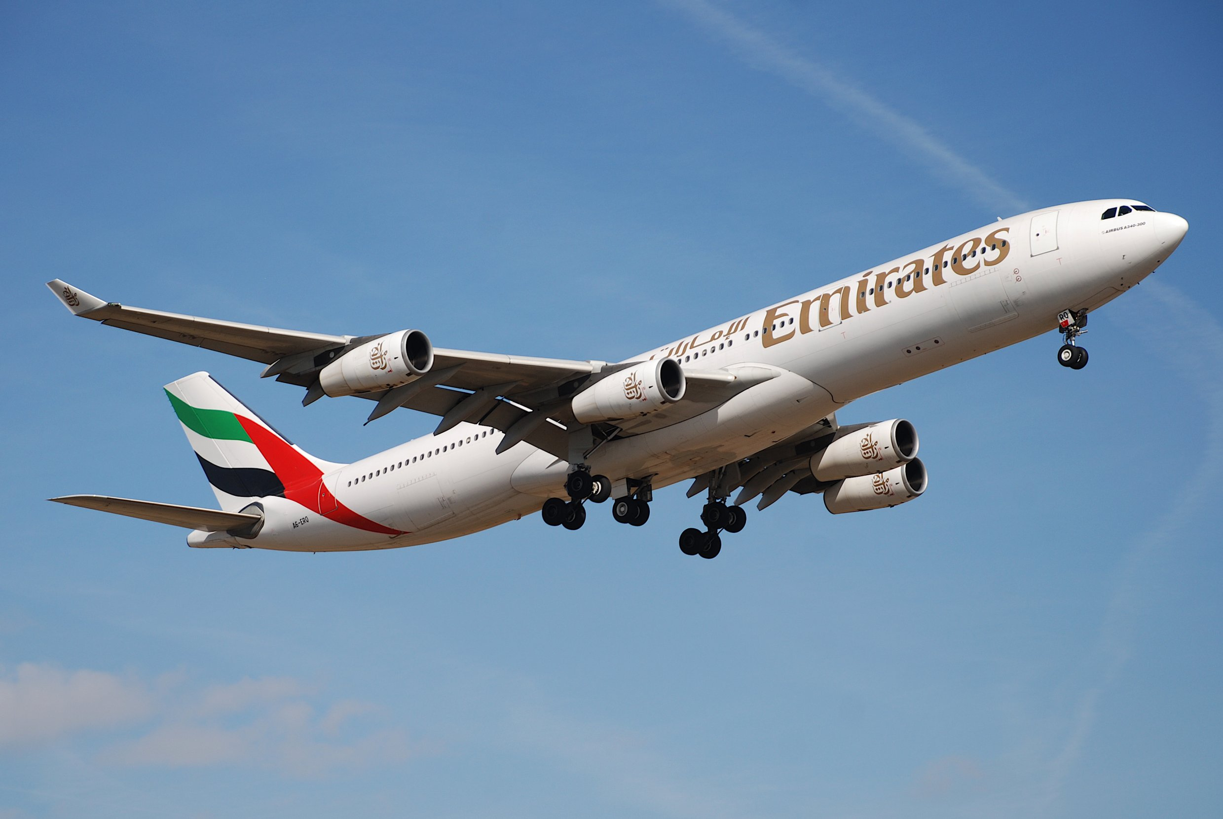 Emirates Airbus A340-300; A6-ERQ@ZRH;26.02.2008/502bc